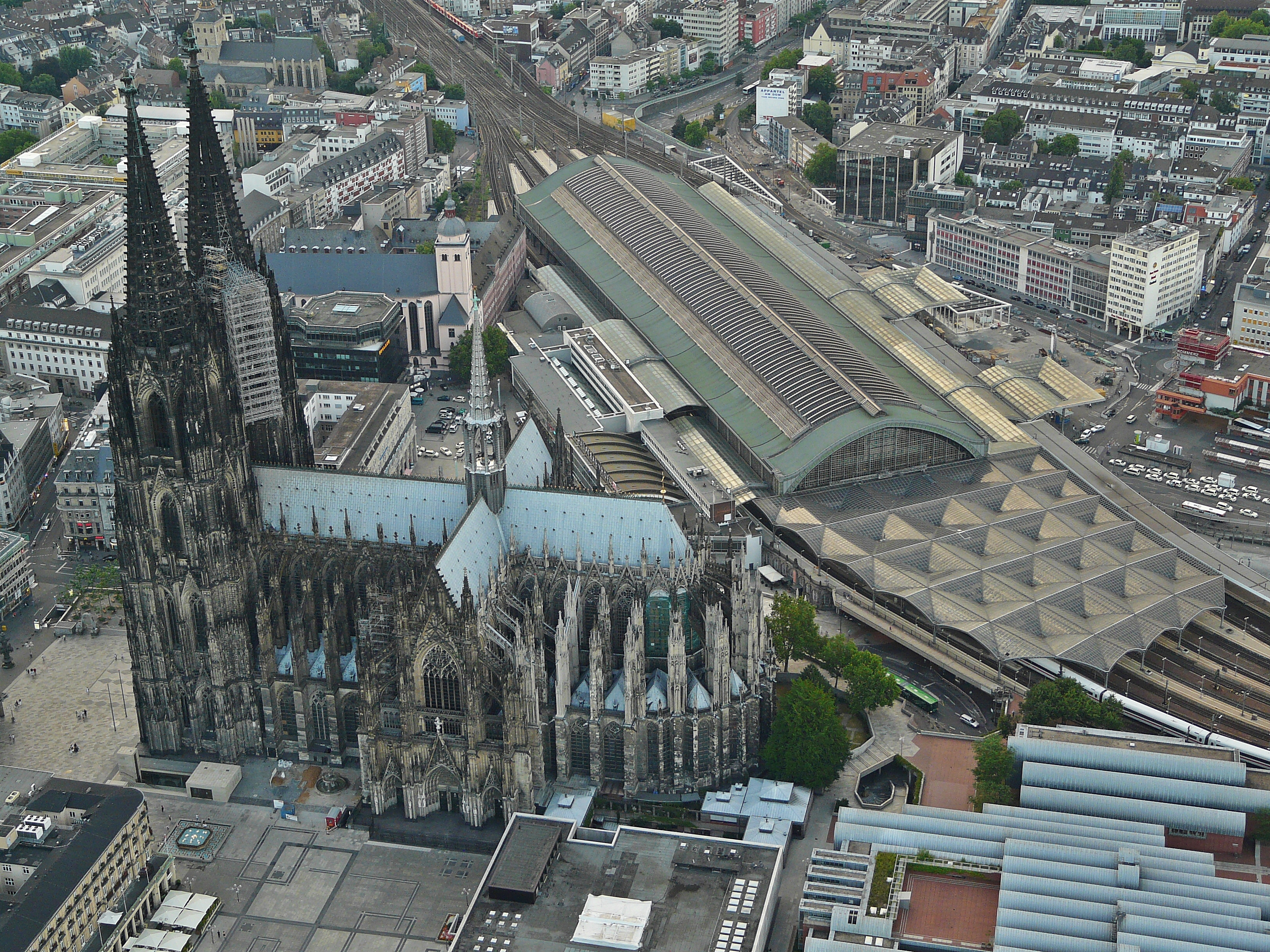 Kölner Dom und Hauptbahnhof